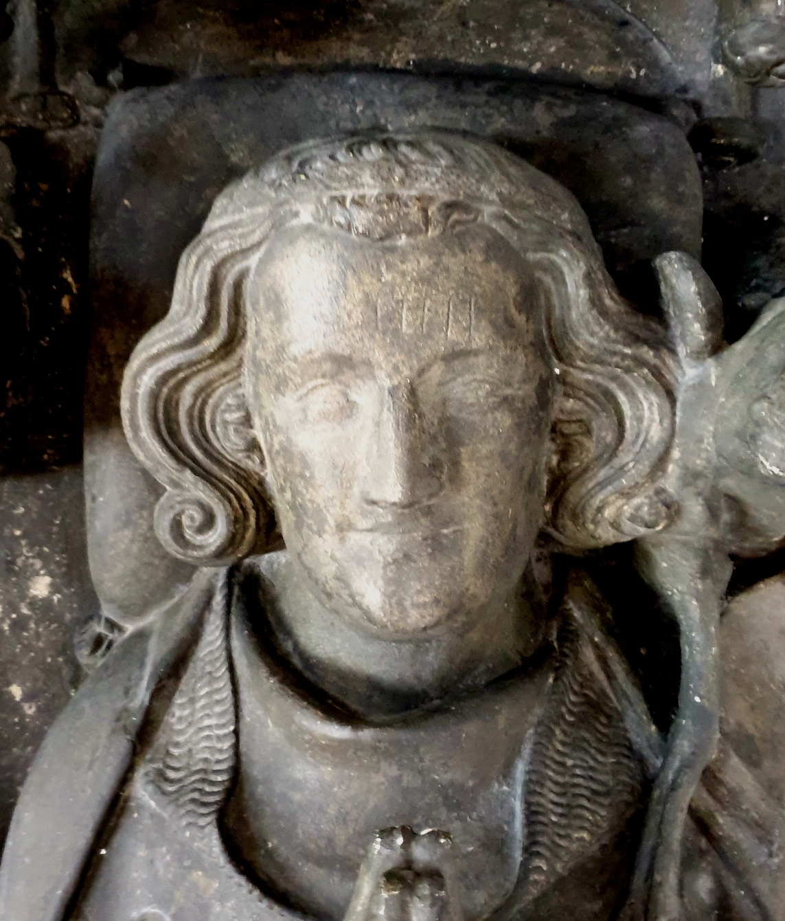 Grabtumba des Grafen und seiner Frau Hedwig zur Lippe in der Neustädter Marienkirche, Bielefeld, Detail